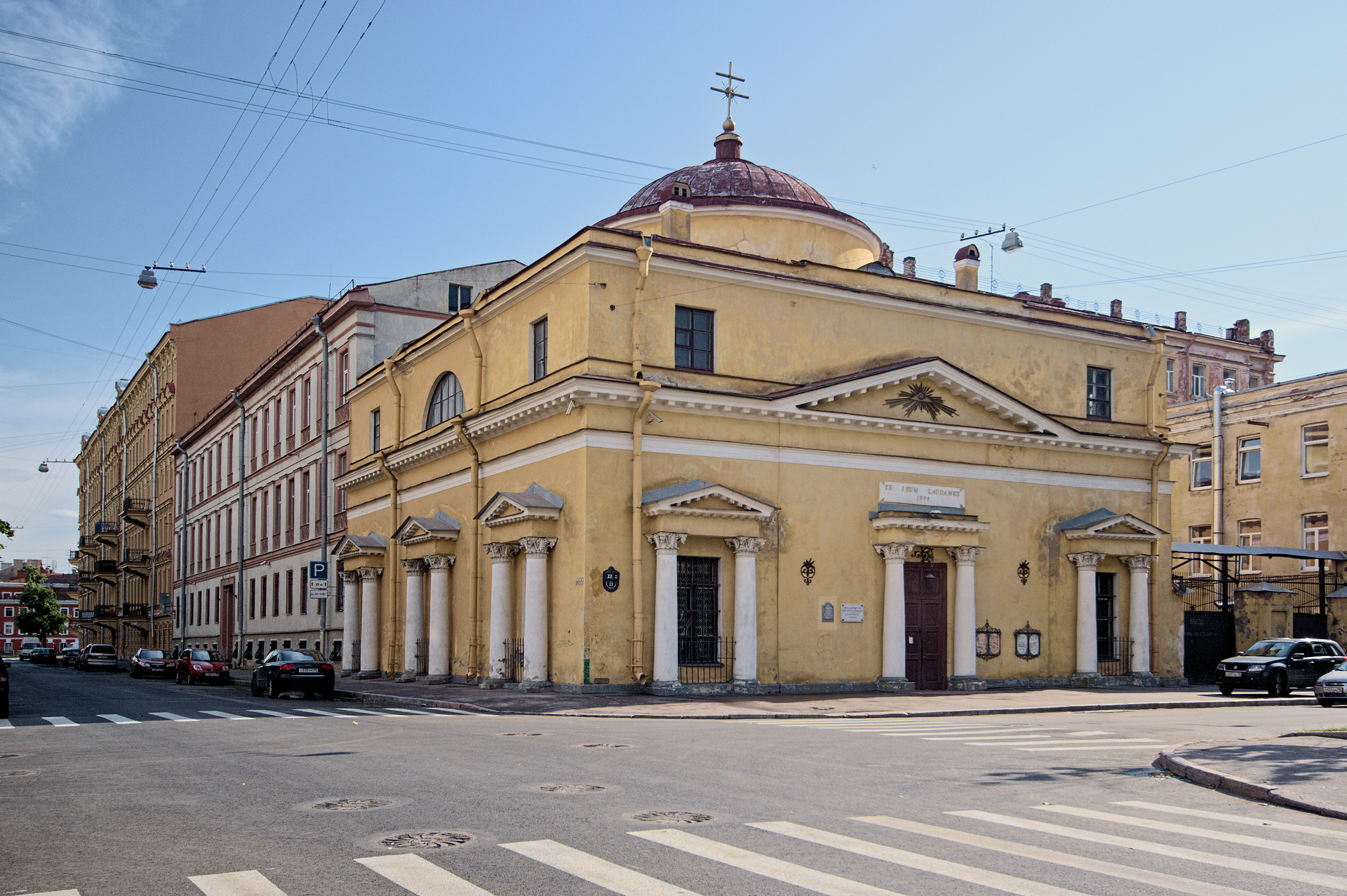 Римско-каталический храм святого Станислава